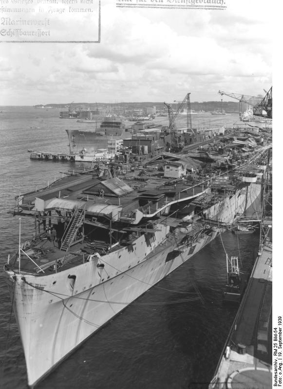 Flugzeugträger "Graf Zeppelin". Baustadium Aufgen. am 19.9.1939 Deutsche Werke Kiel